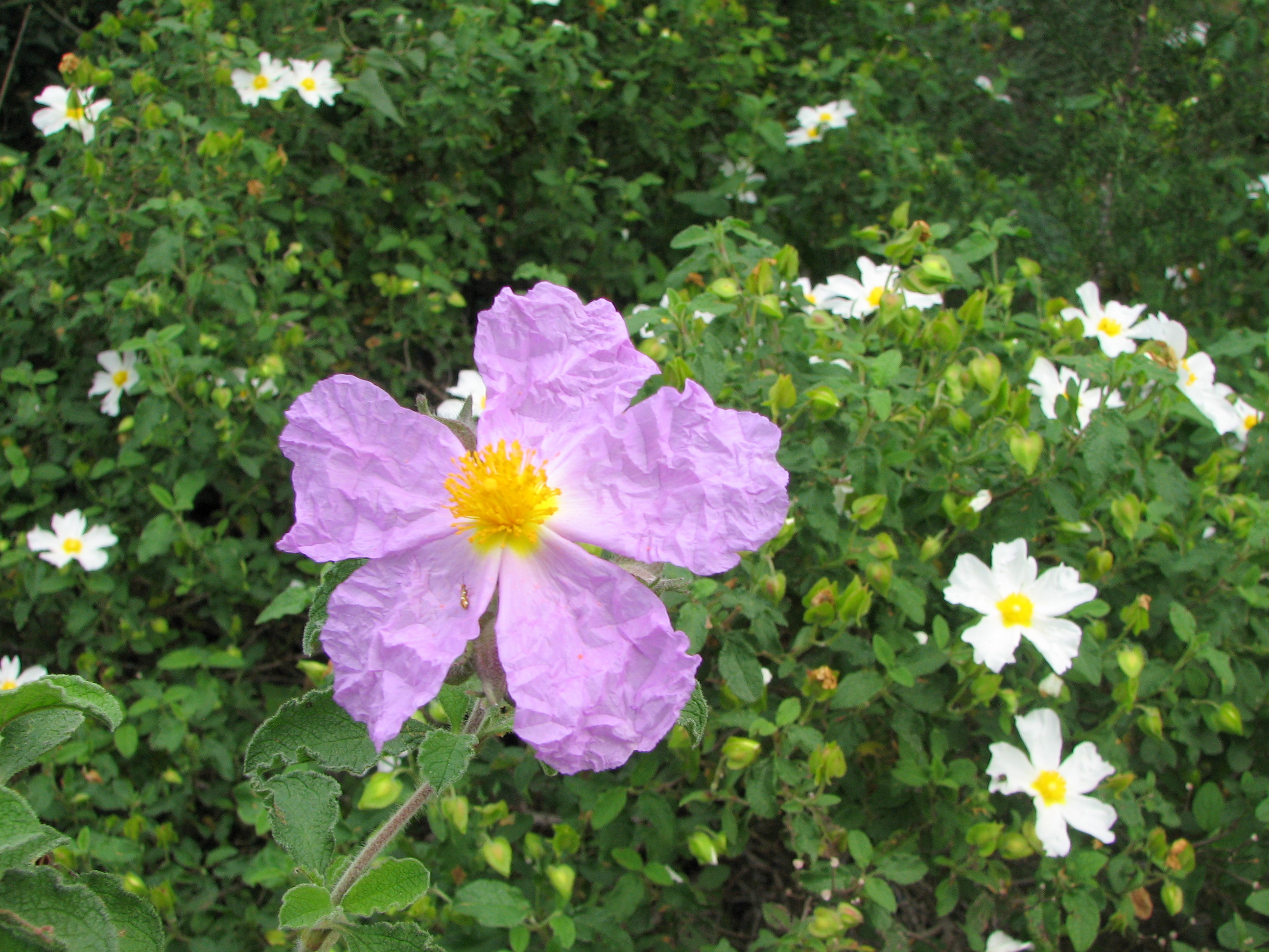 Park Nesher in the city Nesher on Mount Carmel, Israel. In the park there are 2 Suspension bridges, walking paths, Mediterranean forests, woodlands, scrub and flowers. A place for picnic, and playground. The photo describes Cistus creticus on the background of a Cistus salviifolius. פארק נשר בעיר נשר ליד חיפה. הפארק שוכן בהר הכרמל. בפארק שני גשרים תלויים, חורש ים תיכוני, שפע פרחים, וחיות בר. בפארק אזור המיועד לפיקניק שולחנות וספסלים וכן מגרש משחקים לילדים. בואדי קטיע העובר בפארק מסלולי הליכה מסומנים העוברים בואדי ועל מורדותיו. ומערה פרהיסטורית. בפארק גם דרך העוברת על צלע ההר ישירות לגשרים, בה ניתן ללכת גם עם עגלות ילדים וכן ספסלי ישיבה ומרפסות תצפית. מהואדי ניתן לראות תצפיות על אוניברסיטת חיפה ועל שכונותיה של העיר נשר לוטם שעיר